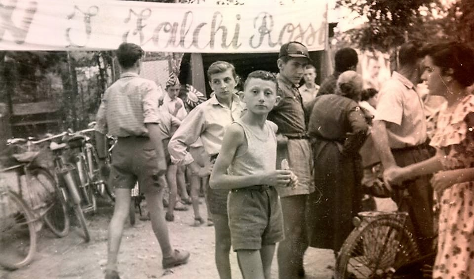 Falchi Rossi, all'interno del festival provinciale dell'Avanti!, Reggio Emilia (quartiere Gattaglio), 1952.